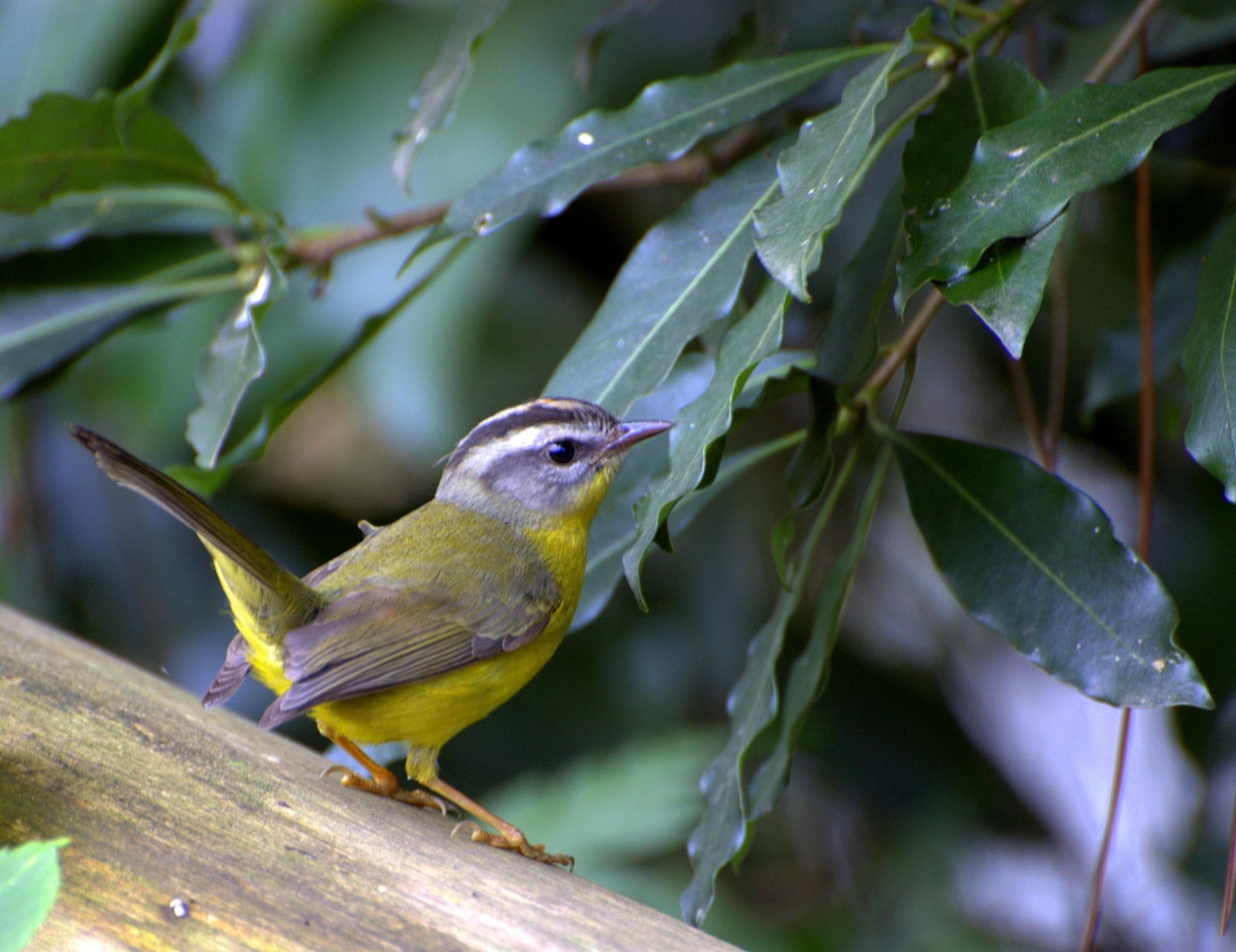 Horto Florestal de São Paulo